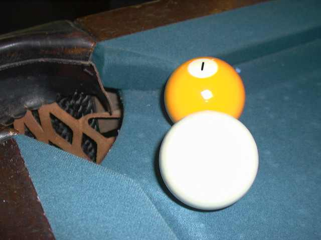 Taken by User:Niteowlneils, June 2004